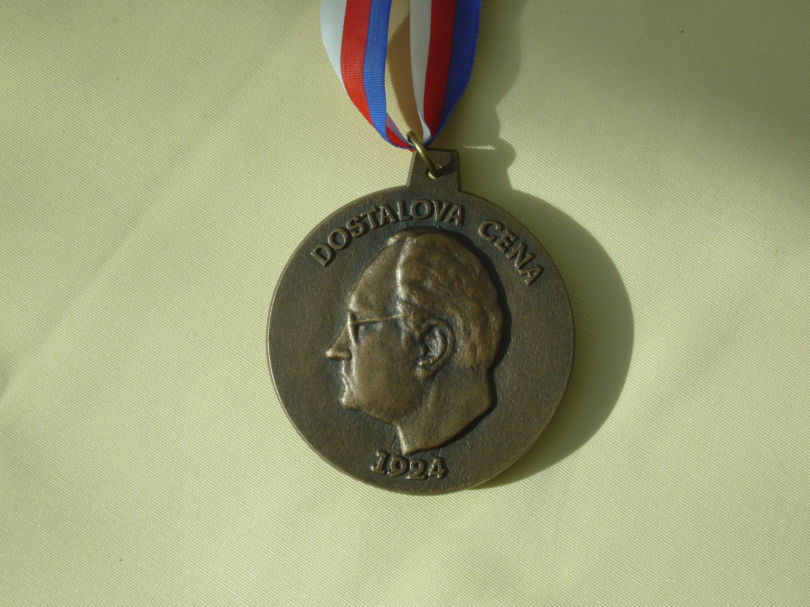 Vorderseite Medaille Dostal Cena (Dostal Stiftung), Šumperk